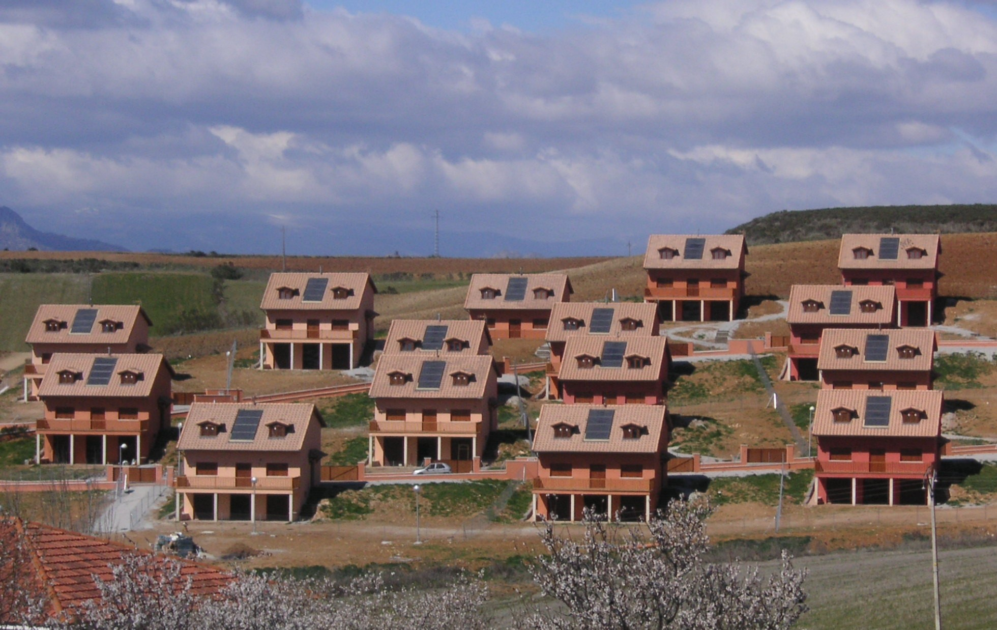 Panorámica de la Ecoaldea de Valdepiélagos